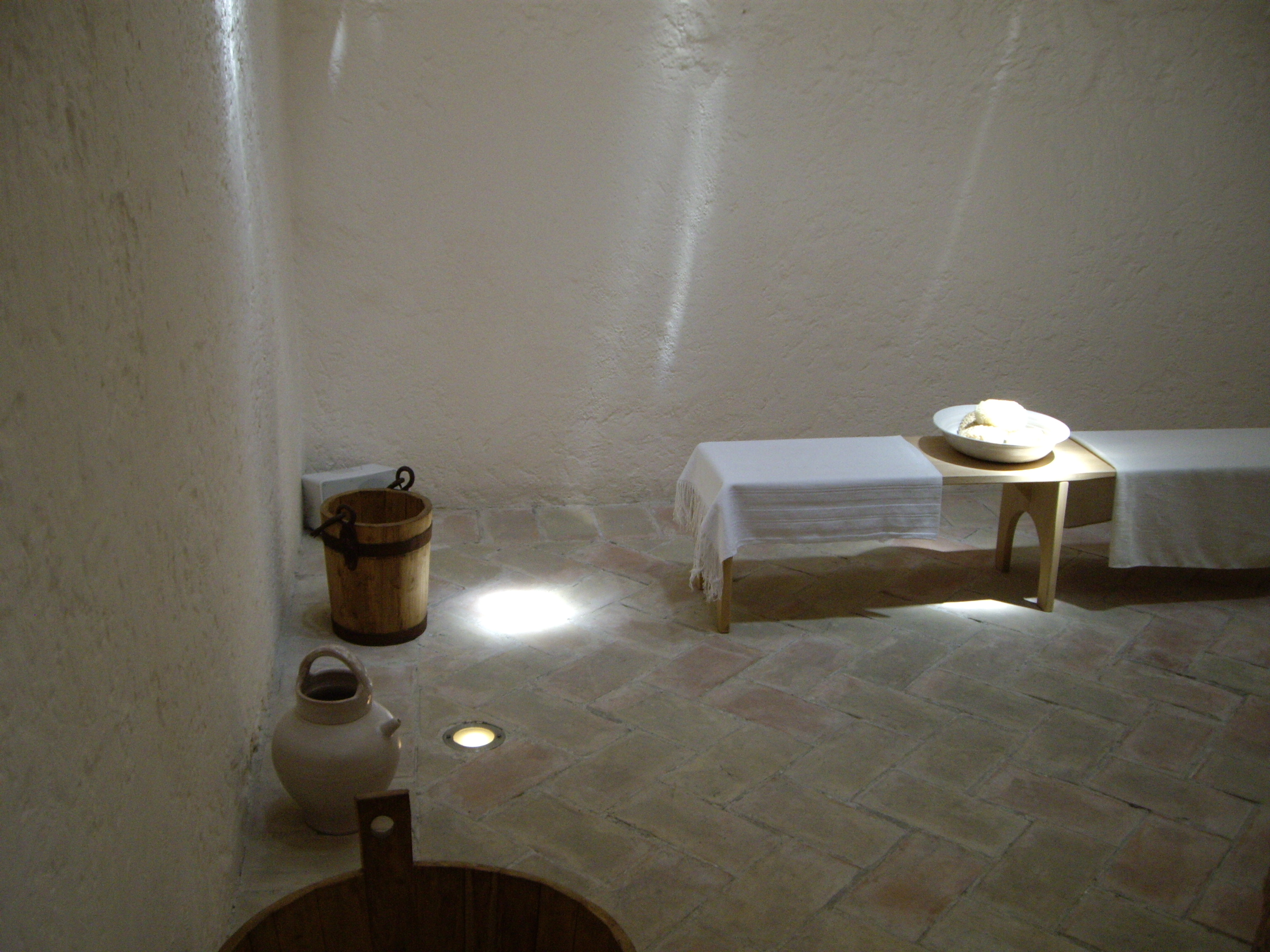 Banys de l'Almirall